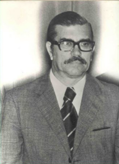 Esc. Miguel Ángel Alterach, alias Toto, (Posadas, 6 de agosto de 1922) es un político y escribano argentino, que ocupó el cargo de Gobernador de Misiones entre el 25 de mayo de 1975 y el 24 de marzo de 1976, cuando es desplazado del cargo por el Proceso de Reorganización Nacional. Con el regreso de la democracia en Argentina acaecido en 1983, resultó electo como diputado nacional, en tres oportunidades (1985, 1989, 1996) y Vicegobernador de Misiones, para el período 1991 hasta 1995, del entonces gobernador Federico Ramón Puerta.